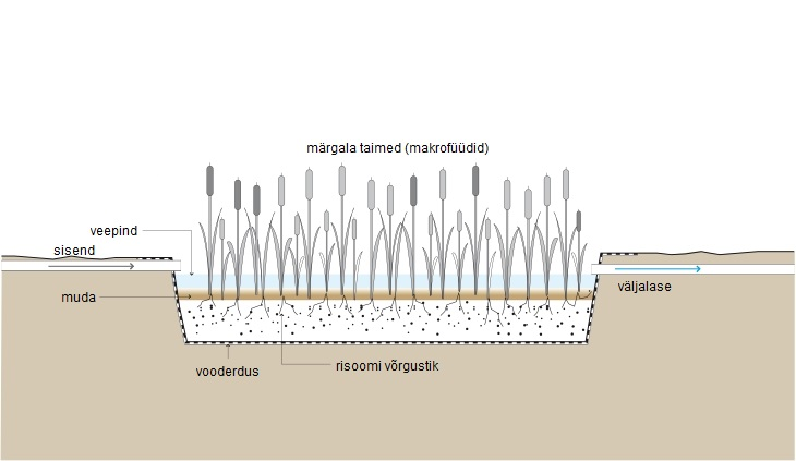 Avaveelise tehismärgala skeem